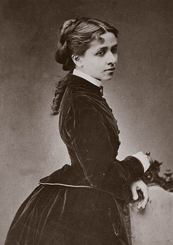 Мамонтова Маргарита Оттовна